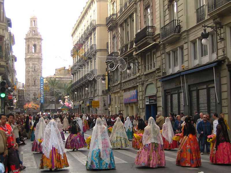 Carrer de la Pau. Processó de l'Ofrena a València (Horta), País Valencià.